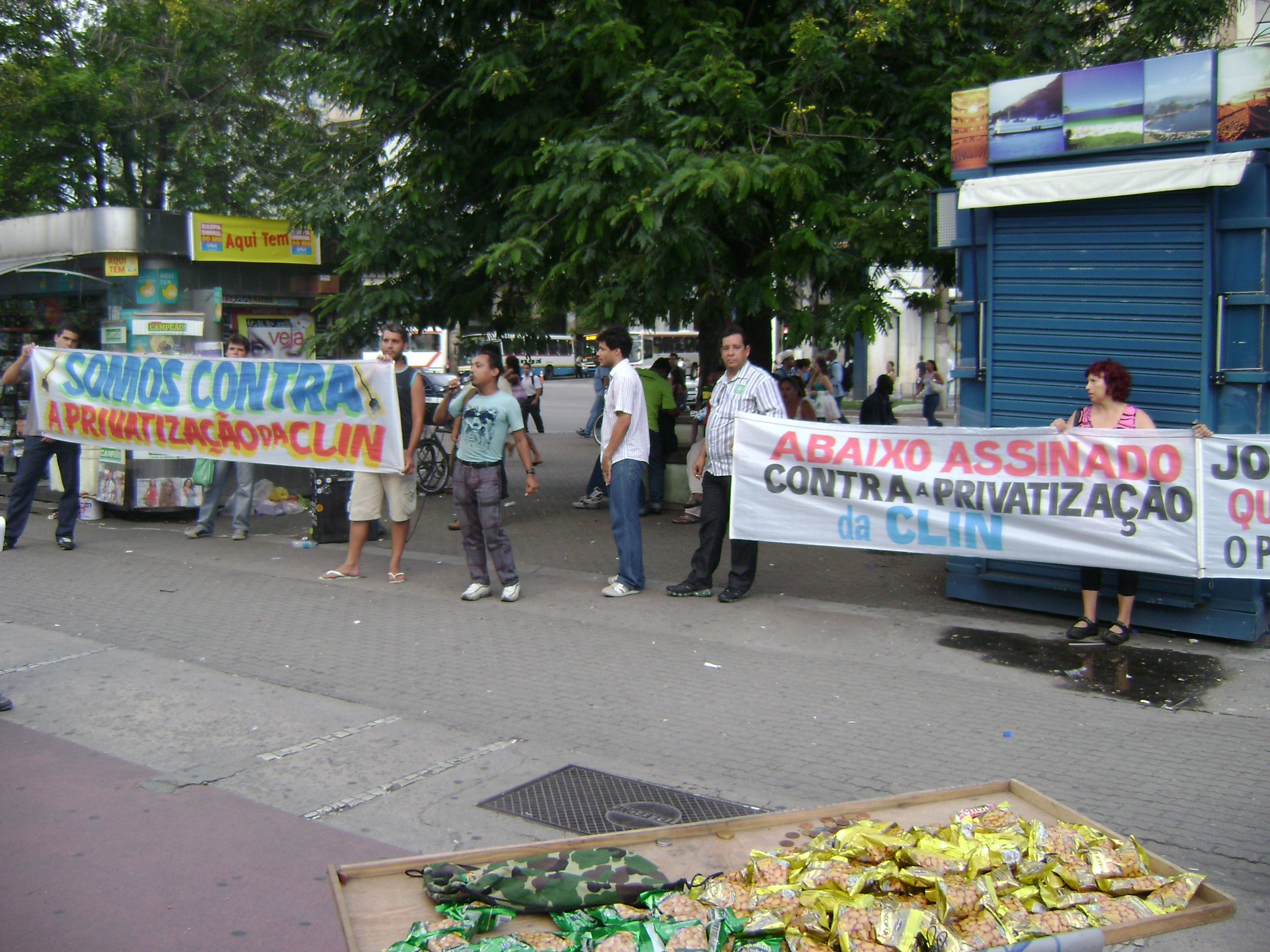 Manifesto contra a privatização da Clin em Niterói, Rio de Janeiro, Brasil.